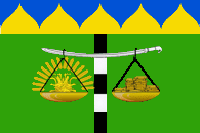 Флаг Бейсугского сельского поселения, Краснодарский край, Россия